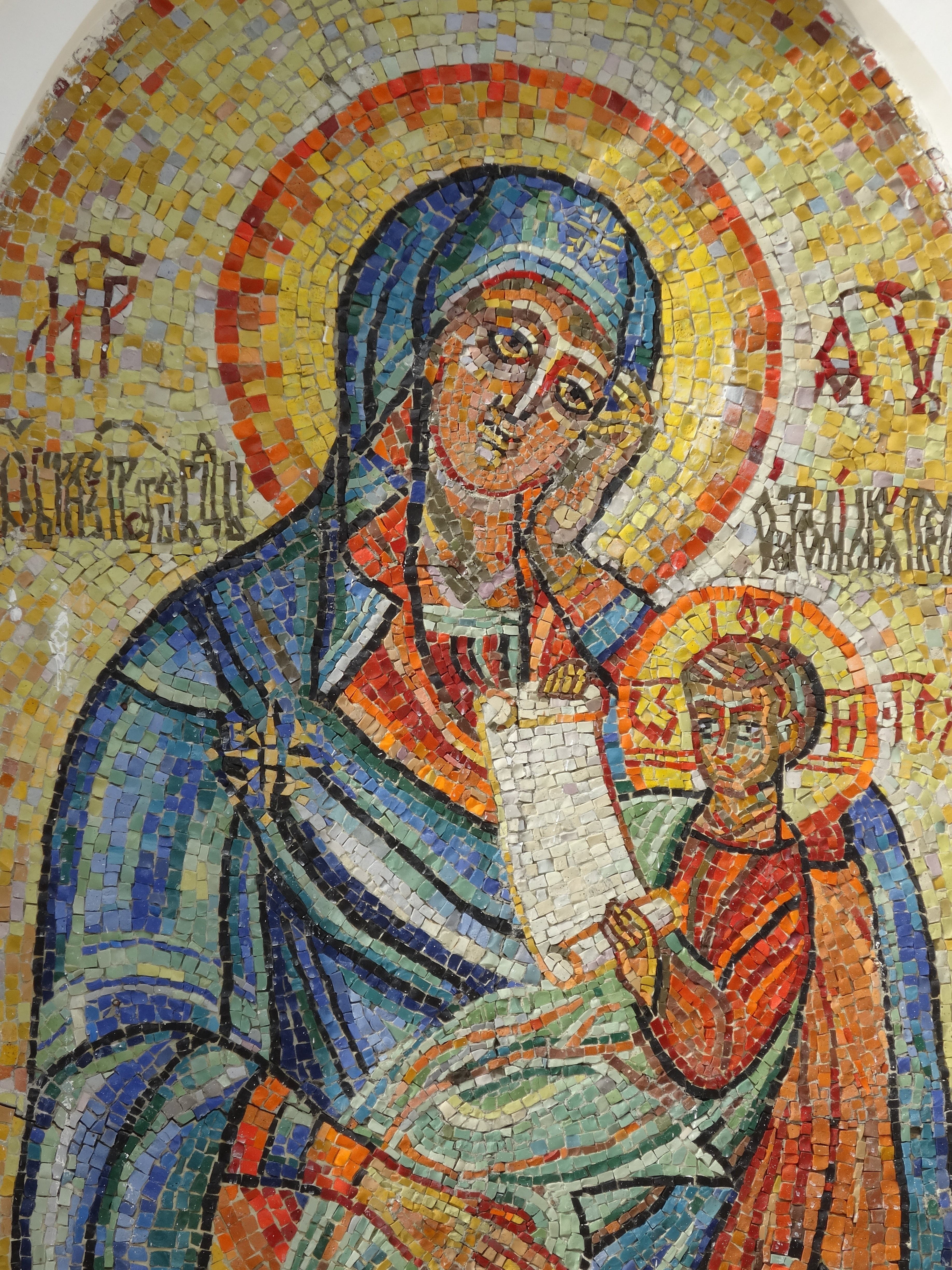 Церковь-часовня «Утоли моя печали»: улица Волжская, 36, Саратов, Саратовская область